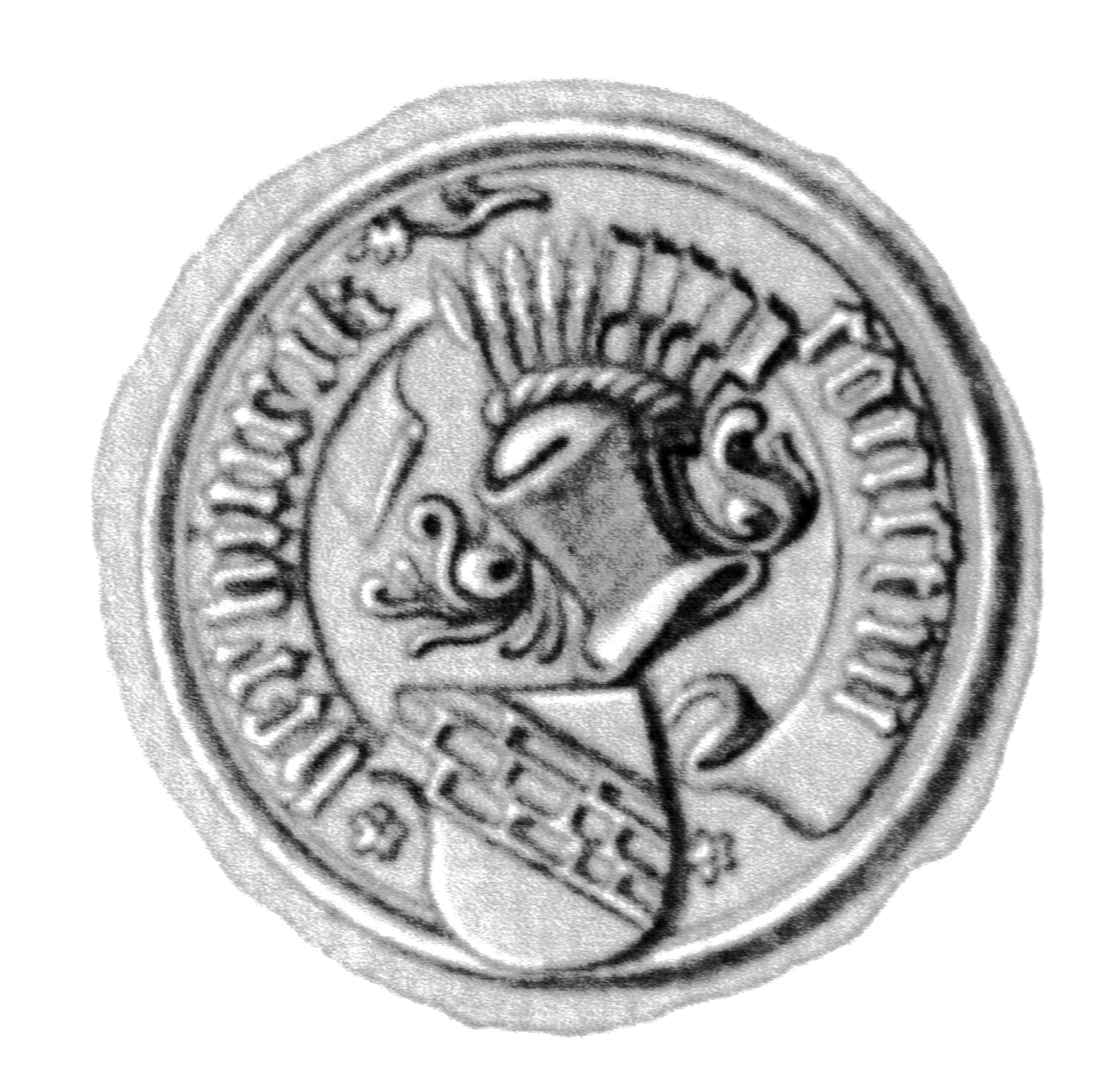 Siegel des Ratsmannes Hinrich Constin. Das Siegel stammt aus der Zeit um 1476. Siehe Emil Ferdinand Fehling: Lübeckische Ratslinie, Nr. 551 (Heinrich Constantin (Constin)).